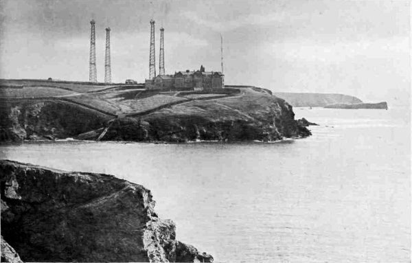 Marconi radio station at Poldhu